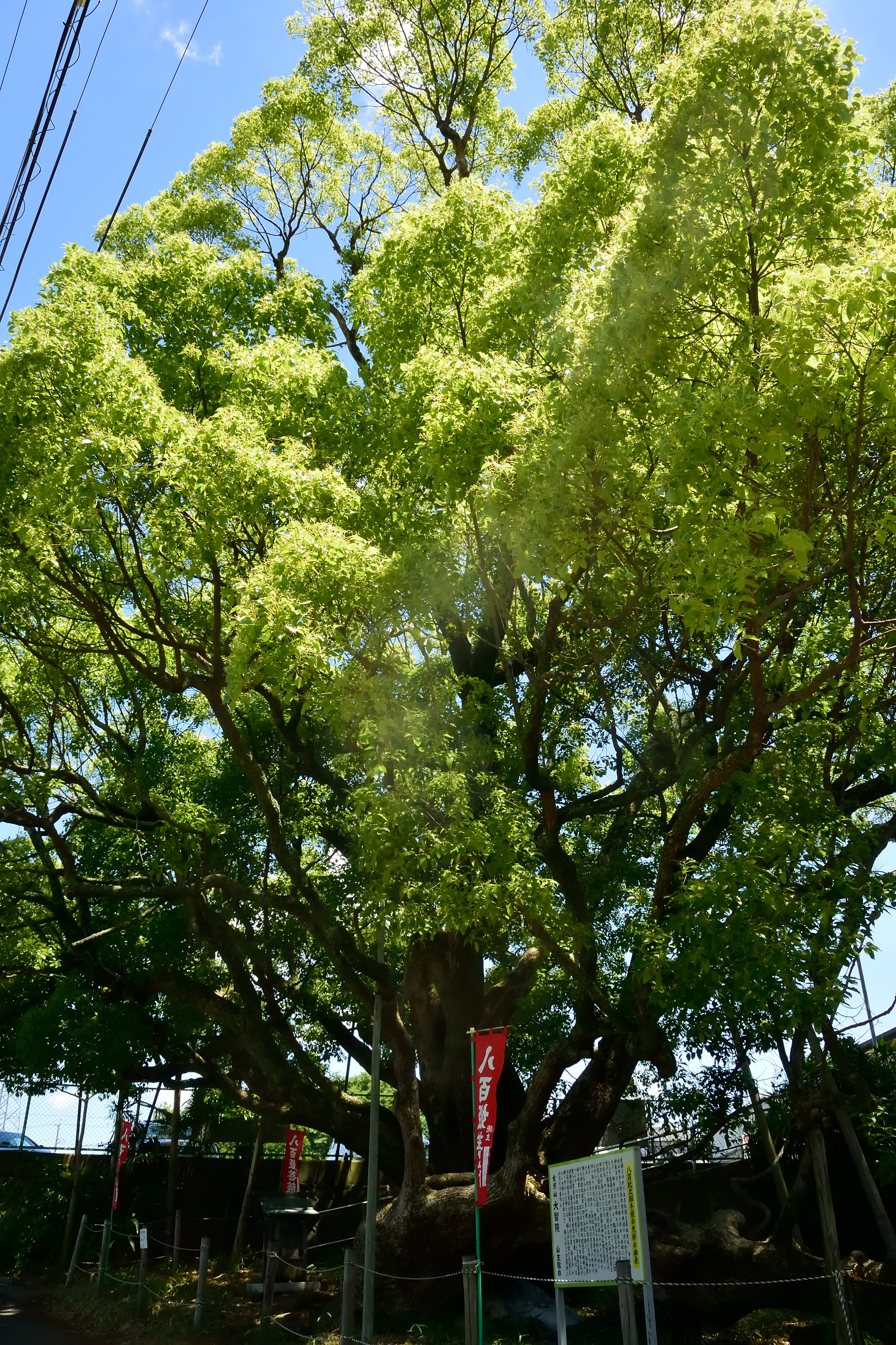 大智院大樟